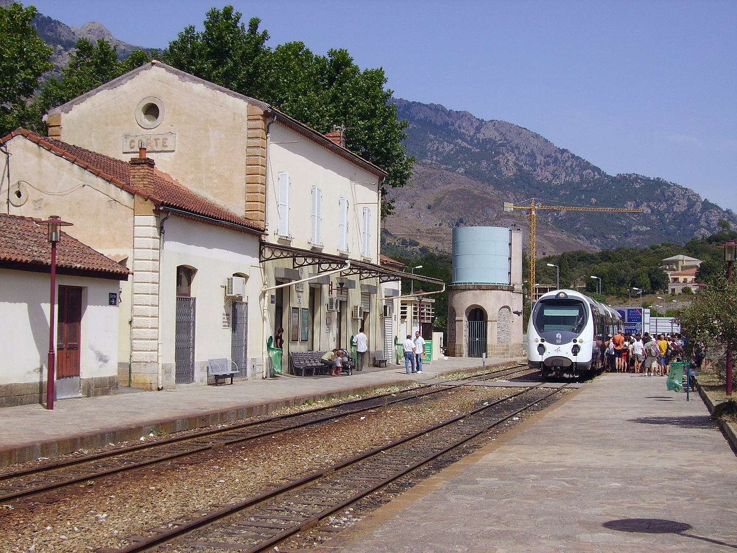 Le train 23 Bastia-Ajaccio stationne en gare de Corte le 22 juillet 2009.